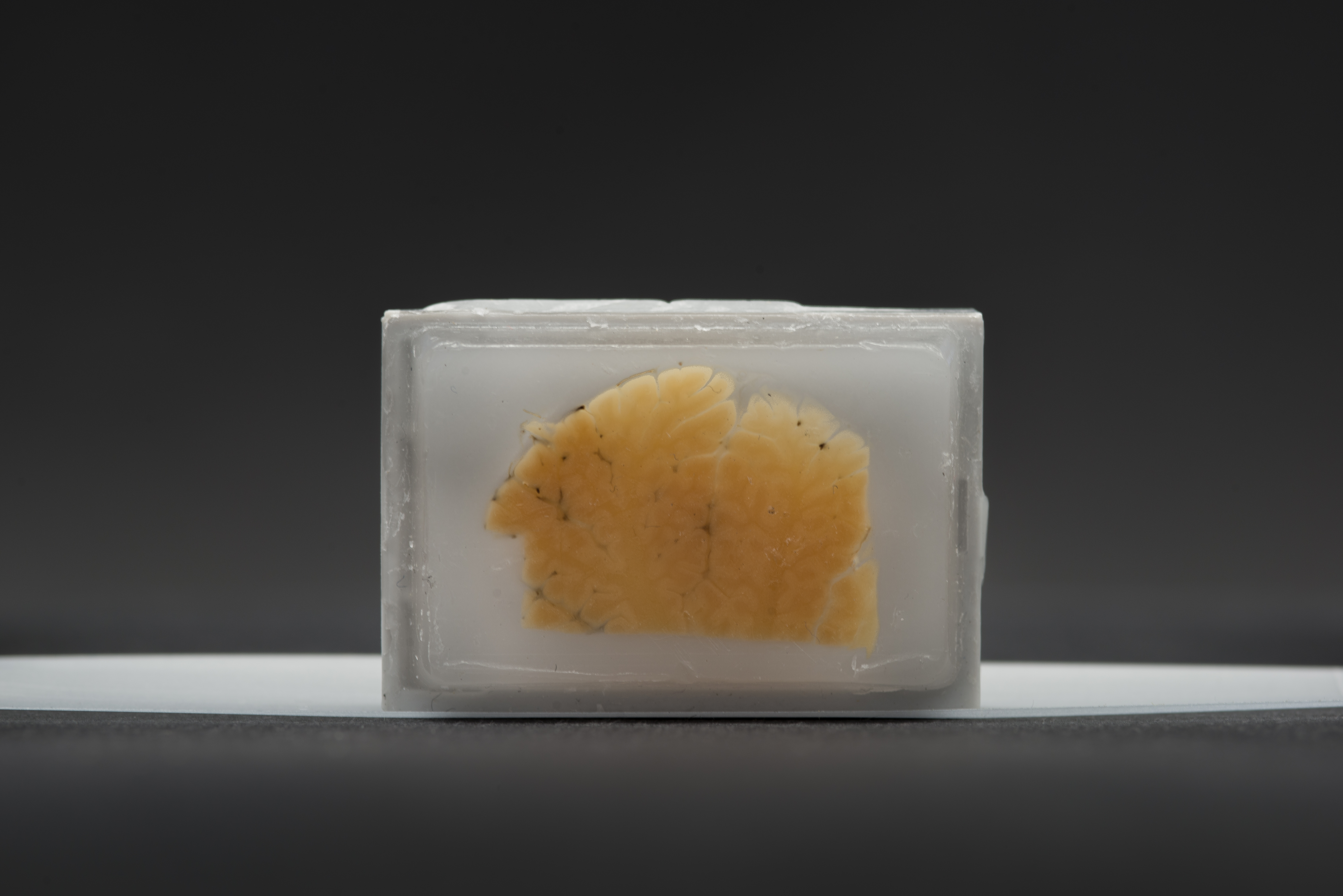 Hirn